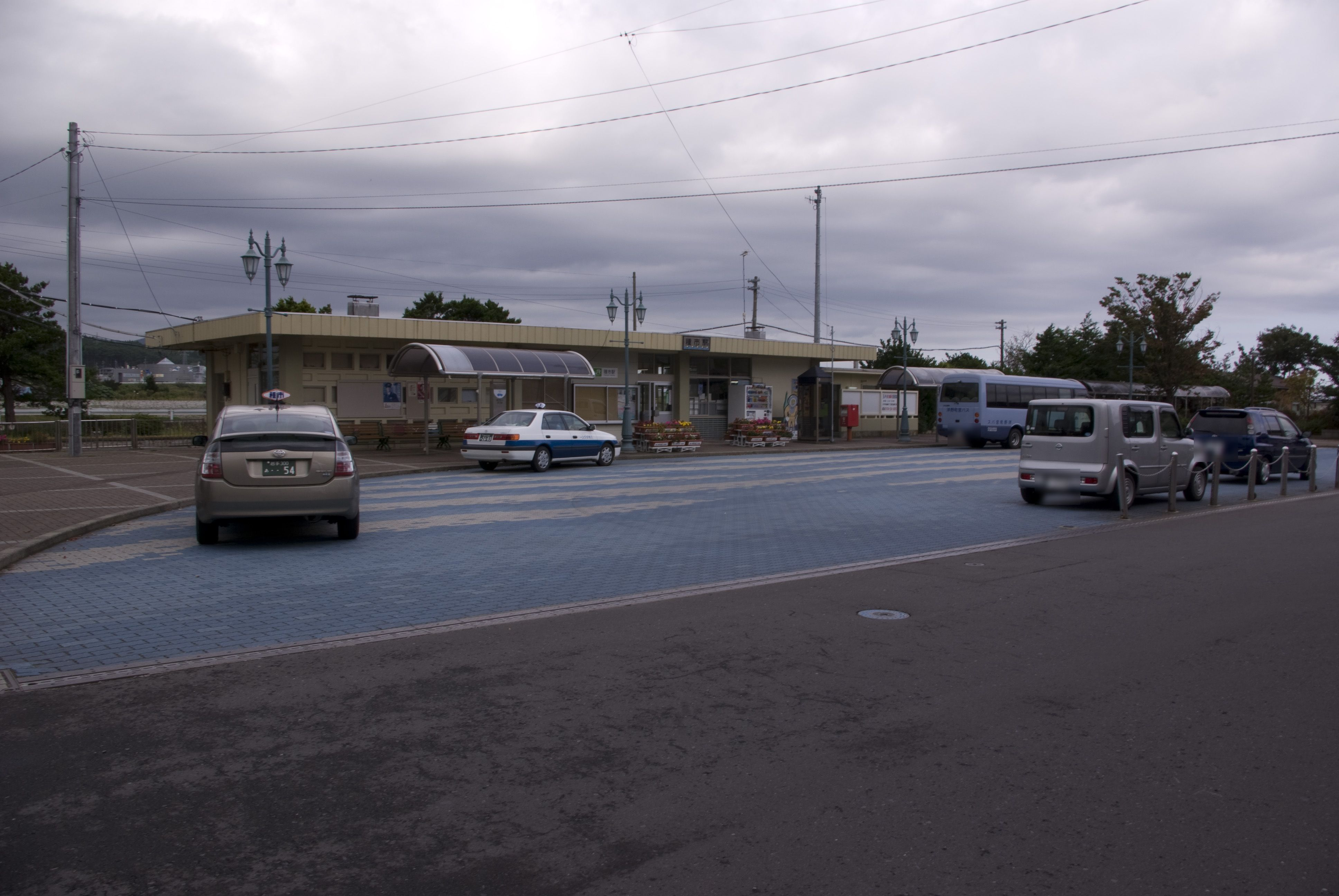 JR八戸線種市駅